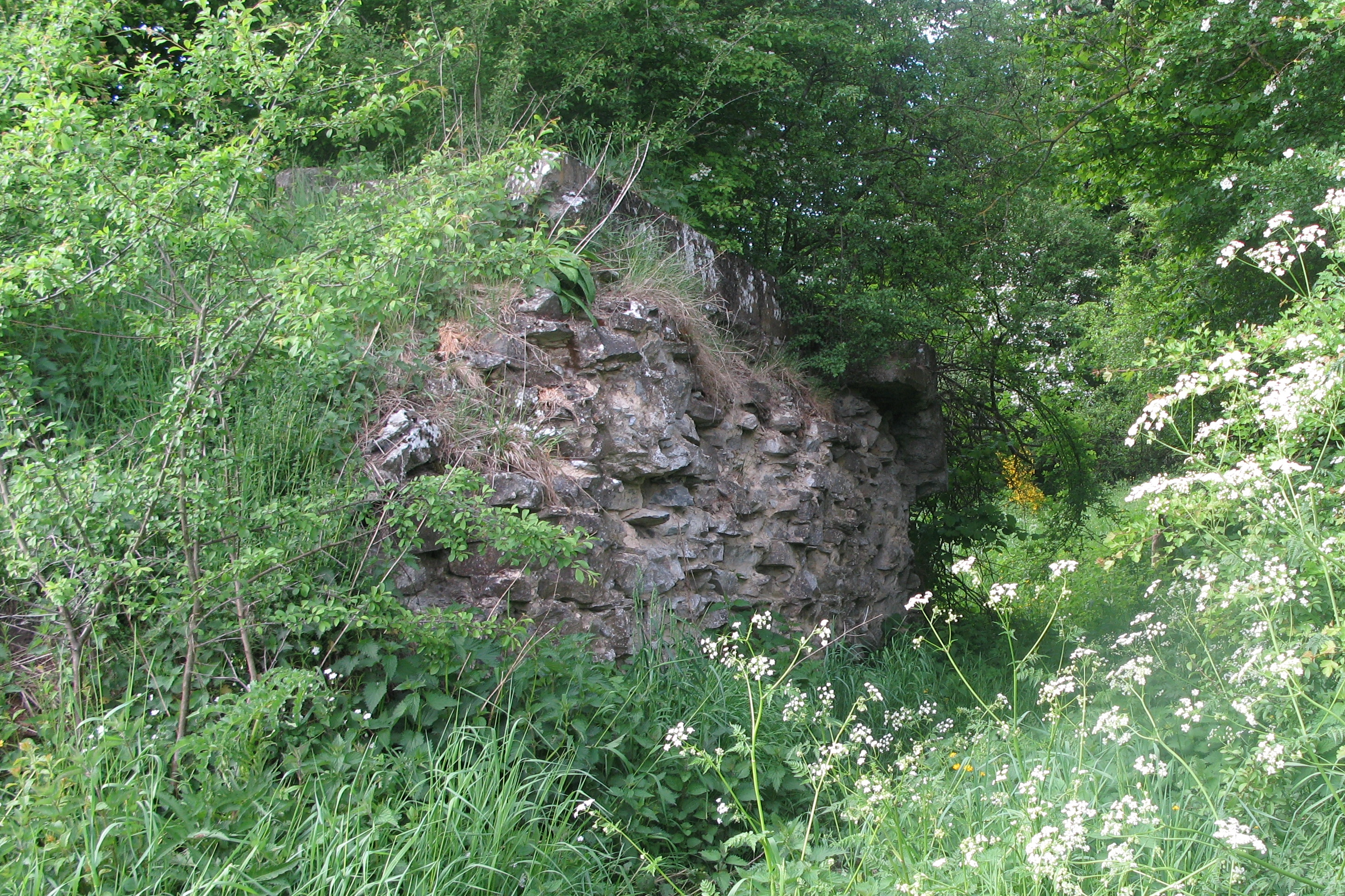 Zesummegefale Bréck op der SNCB-Linn 164 zu Neffe.